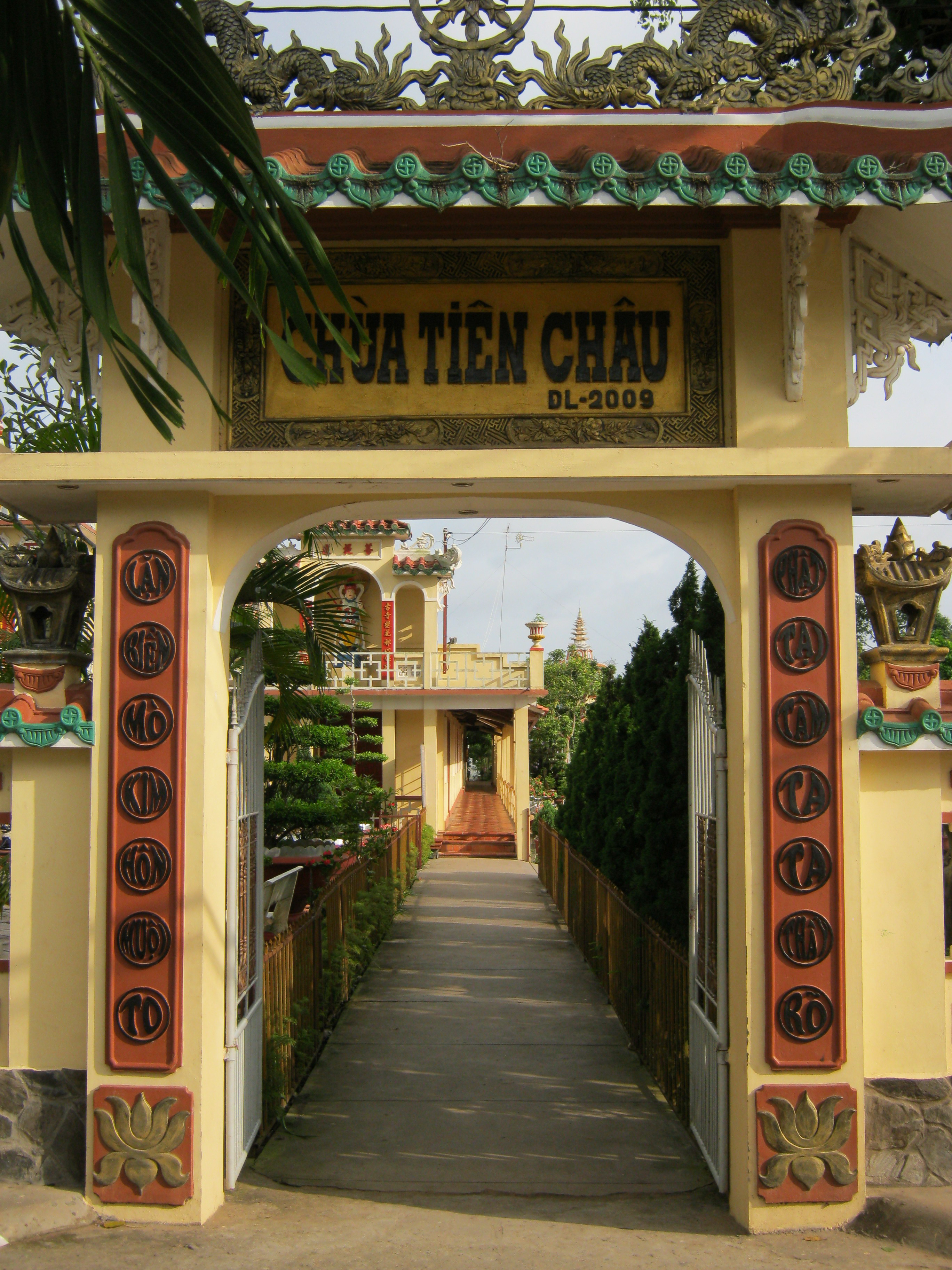 Cổng chùa Tiên Châu ở cù lao An Bình, thuộc huyện Long Hồ, tỉnh Vĩnh Long (Việt Nam).